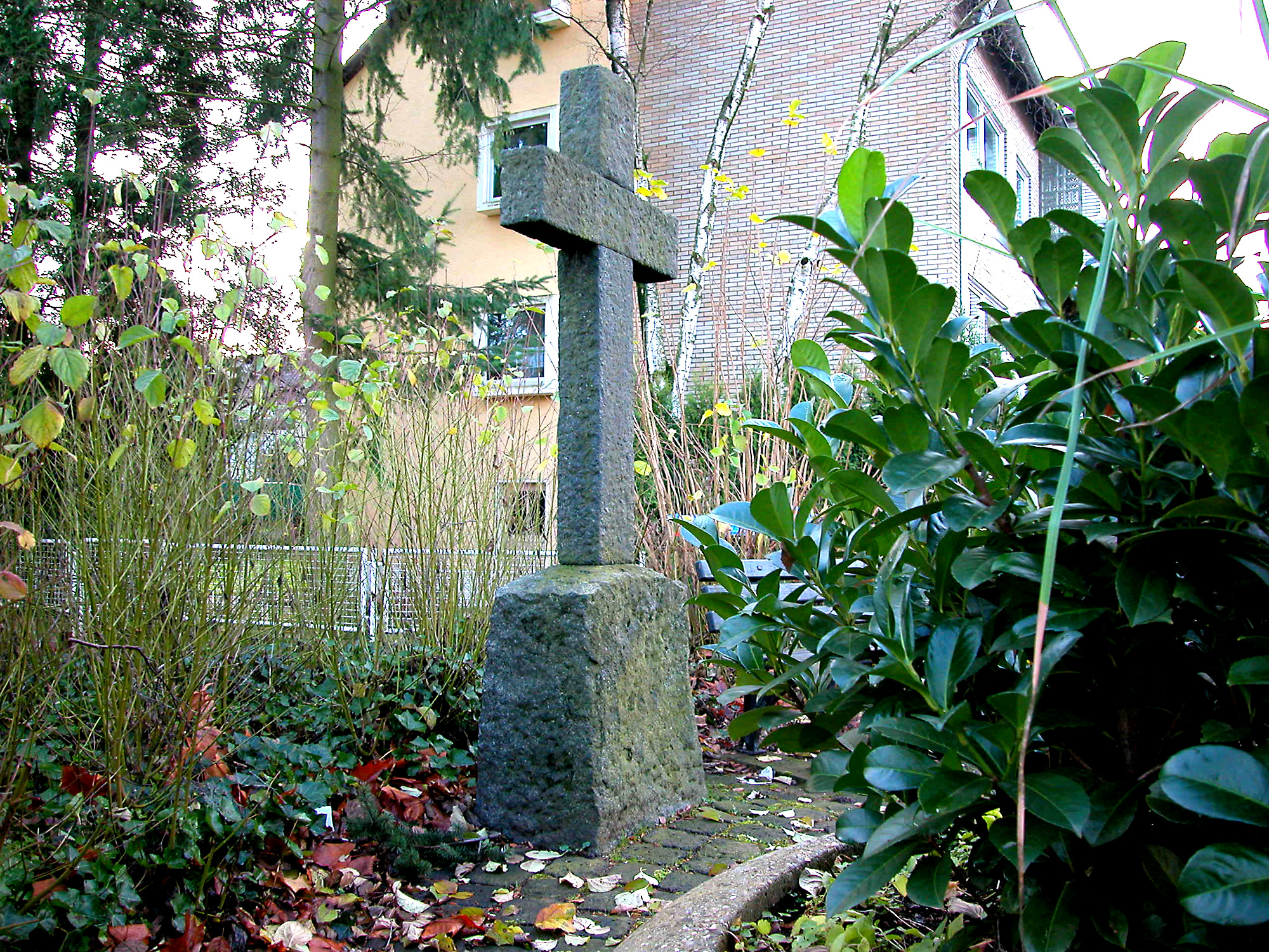 Wegkreuz, Benrath Duesseldorf